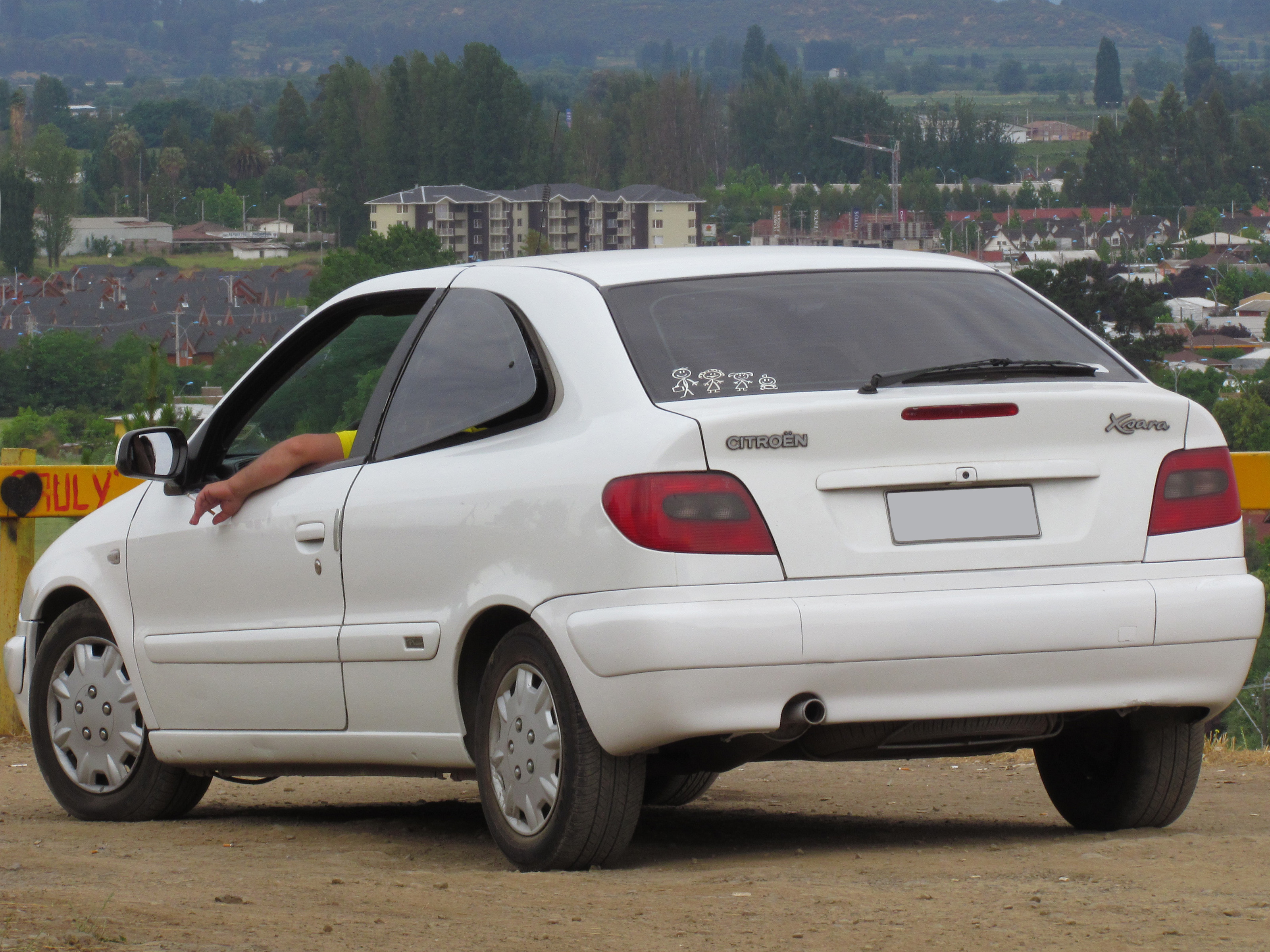 Citroen Xsara 1.6i SX Plaisir 2001